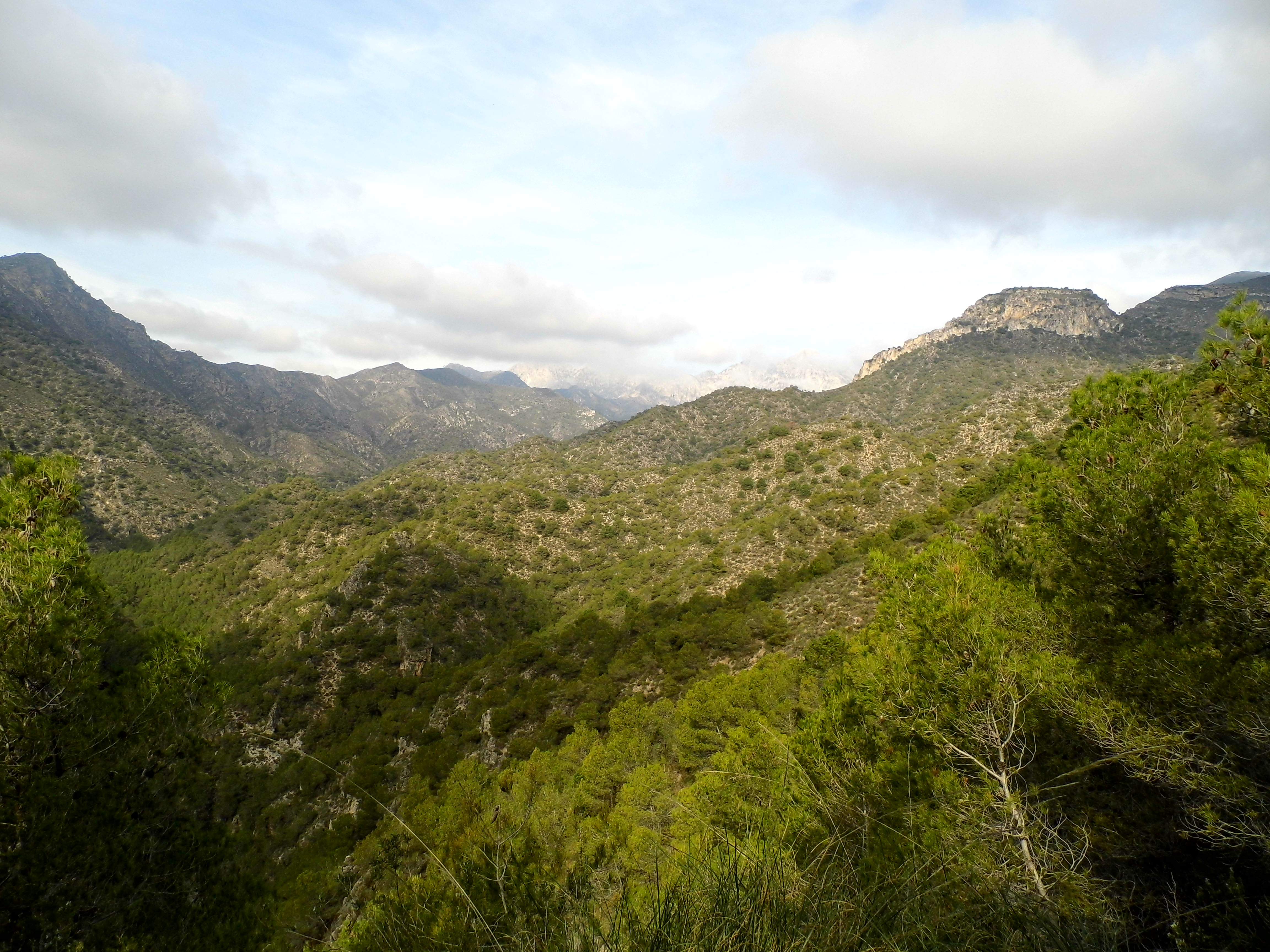 Parque natural de las Sierras de Tejeda, Almijara y Alhama This is a photography of a Site of Community Importance in Spain with the ID: ES6170007. Natura2000 entry, EEA entry